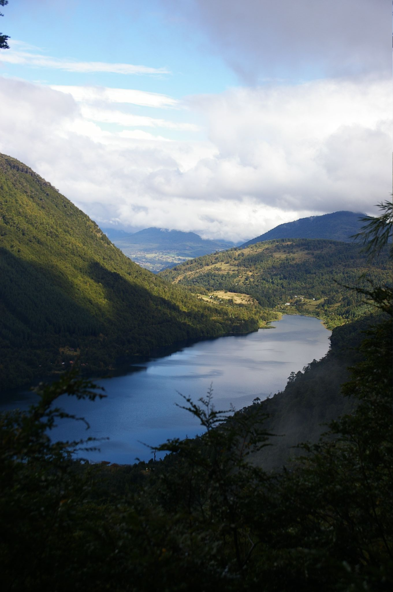 Lago Tinquilco, Huerquehue NP, Chile.